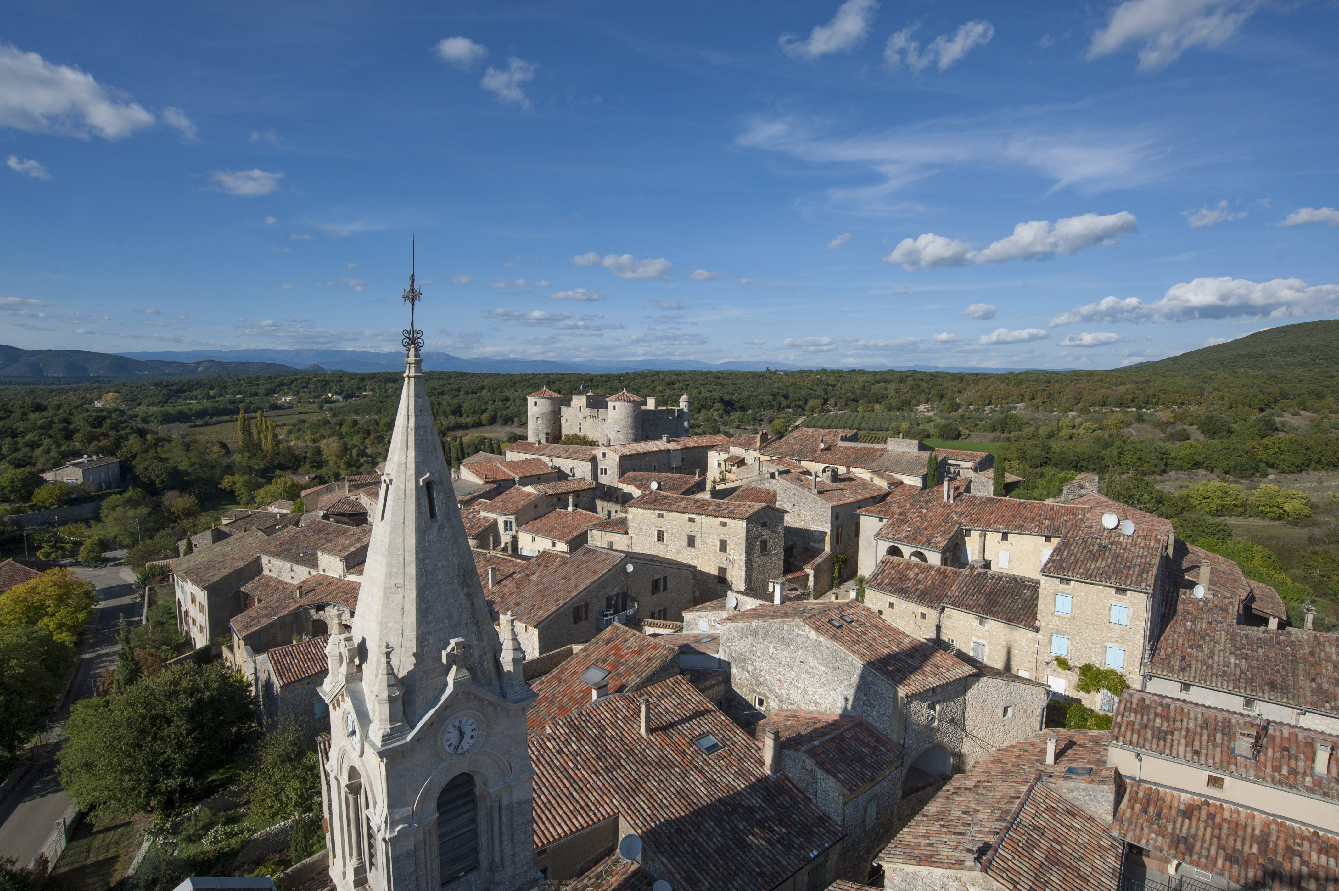 Le village de Labastide de Virac pris par J.M Andre lors de la restauration de l'Eglise.